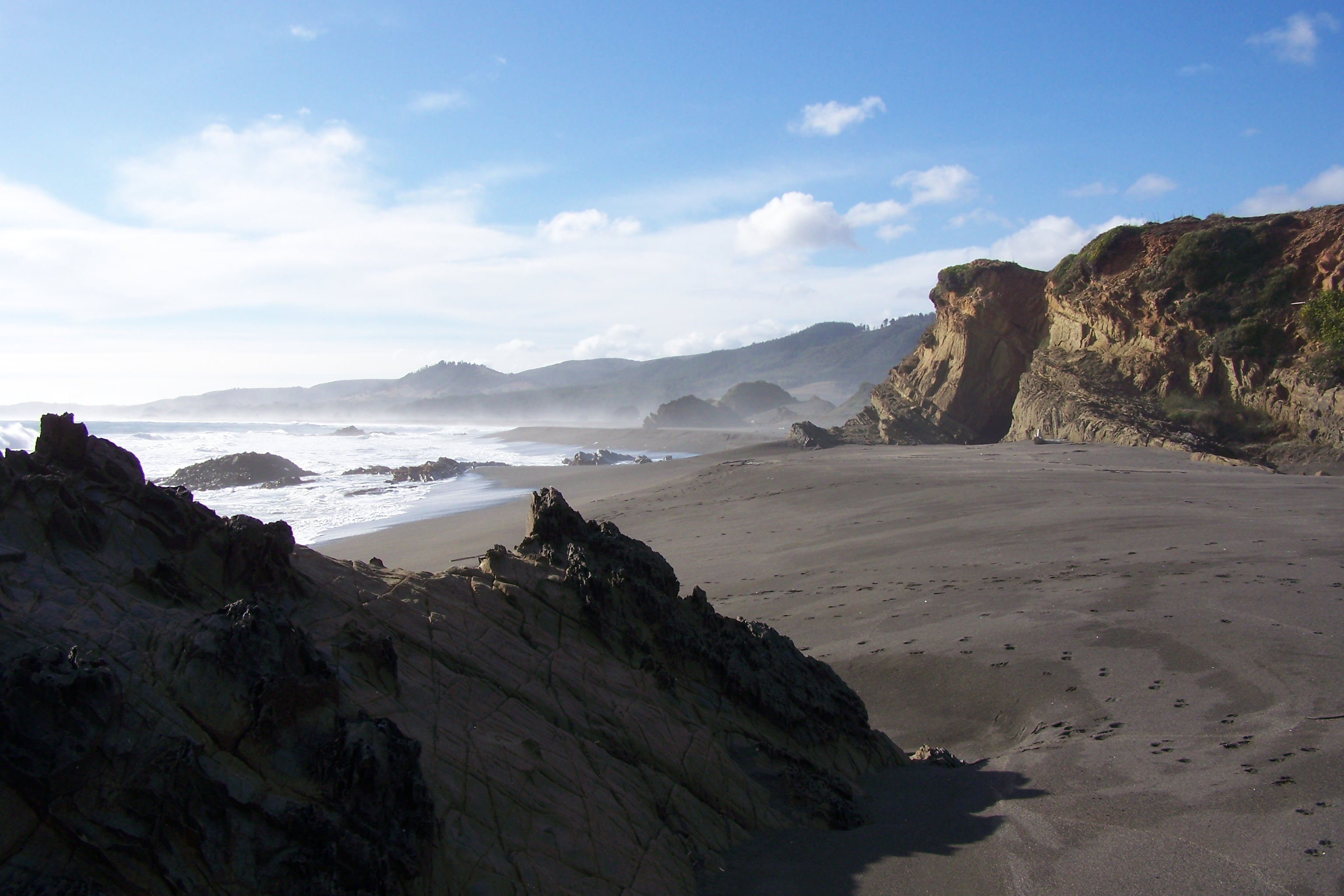 colmuyao